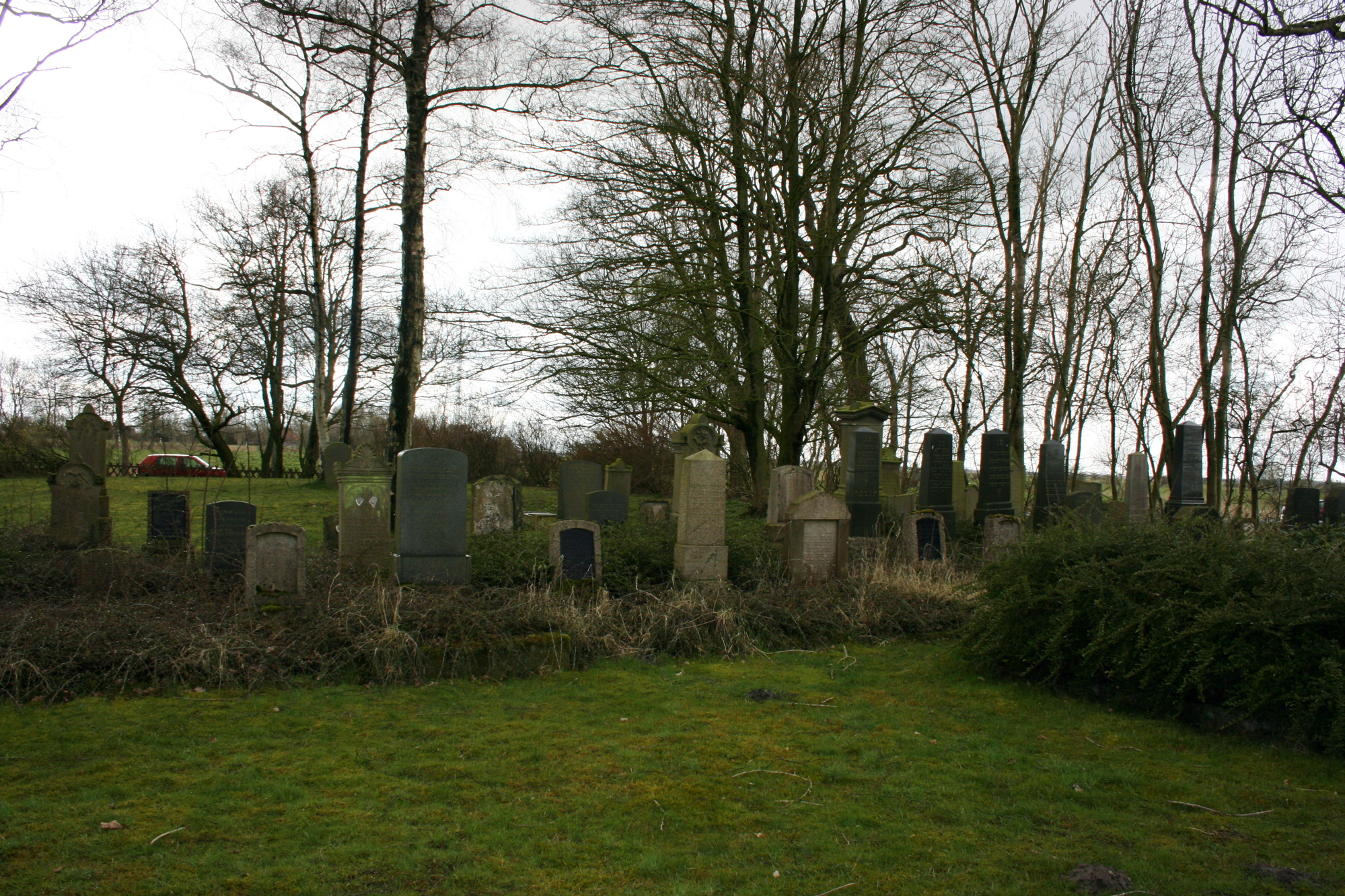 jewish cemetery in Neustadtgödens2